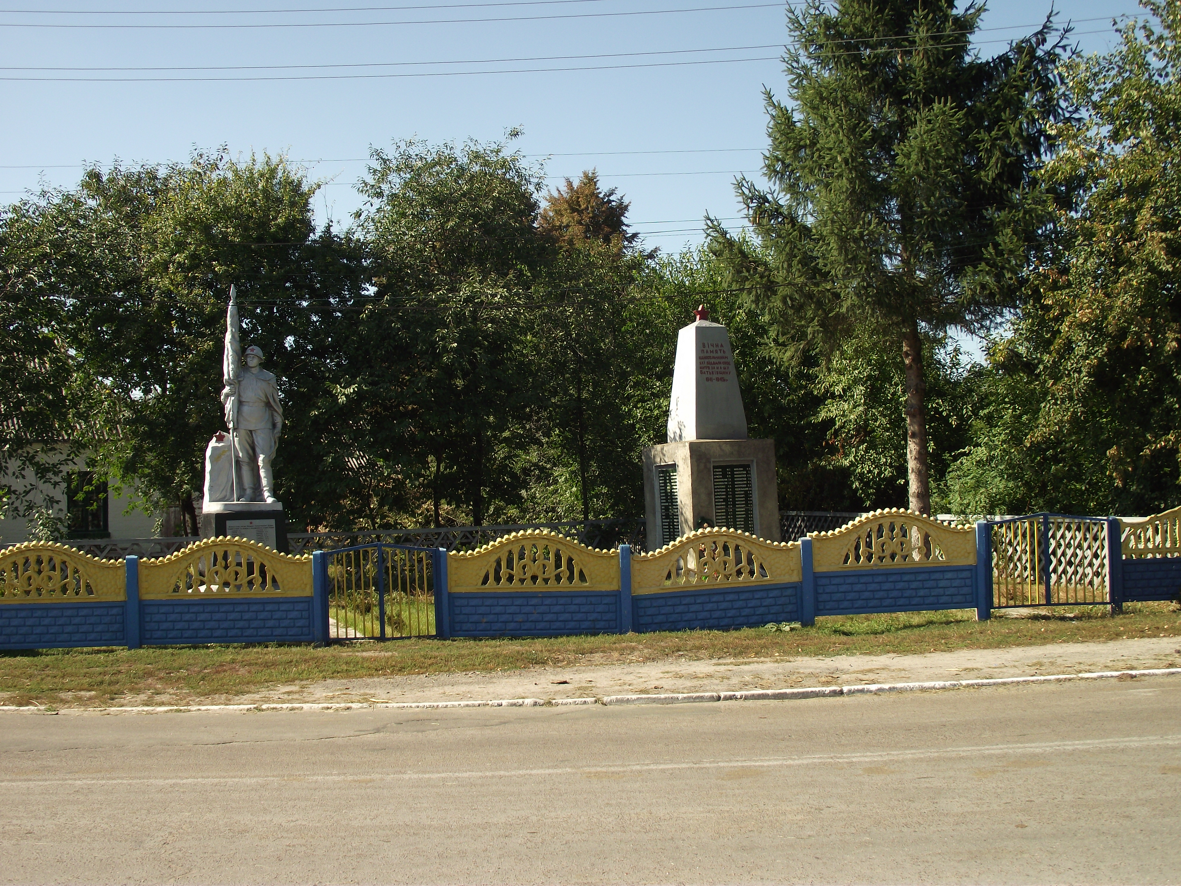 Соснівка, пам'ятник жертвам Другої Світової Війни.